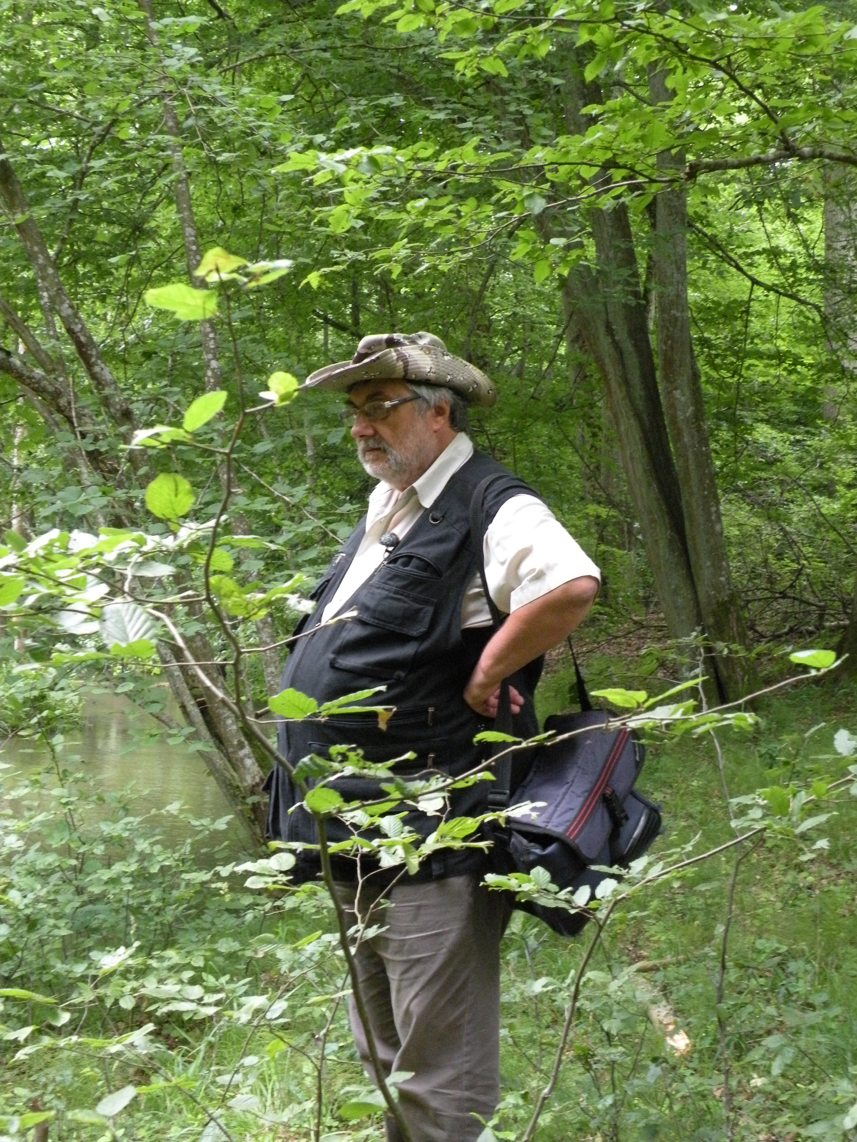 Tomasz Kłosowski, w trakcie zdjęć do Dzikiej Polski, rezerwat Las Warmiński